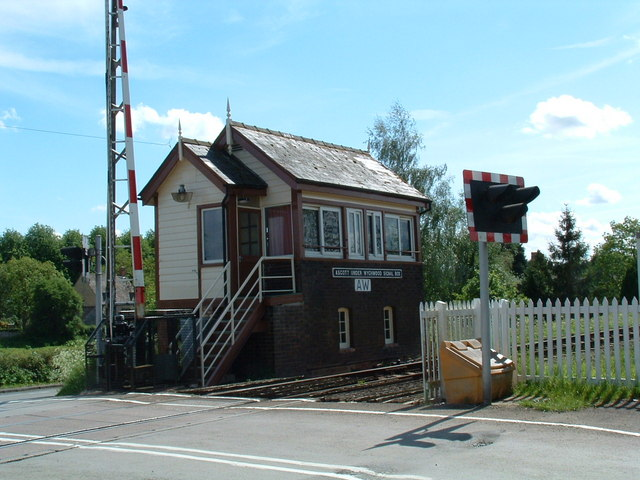 Ascott-under-Wychwood Signal Box